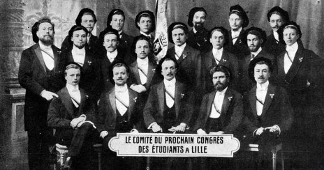 Le comité de préparation du congrès de fondation de l'UNAGEF.